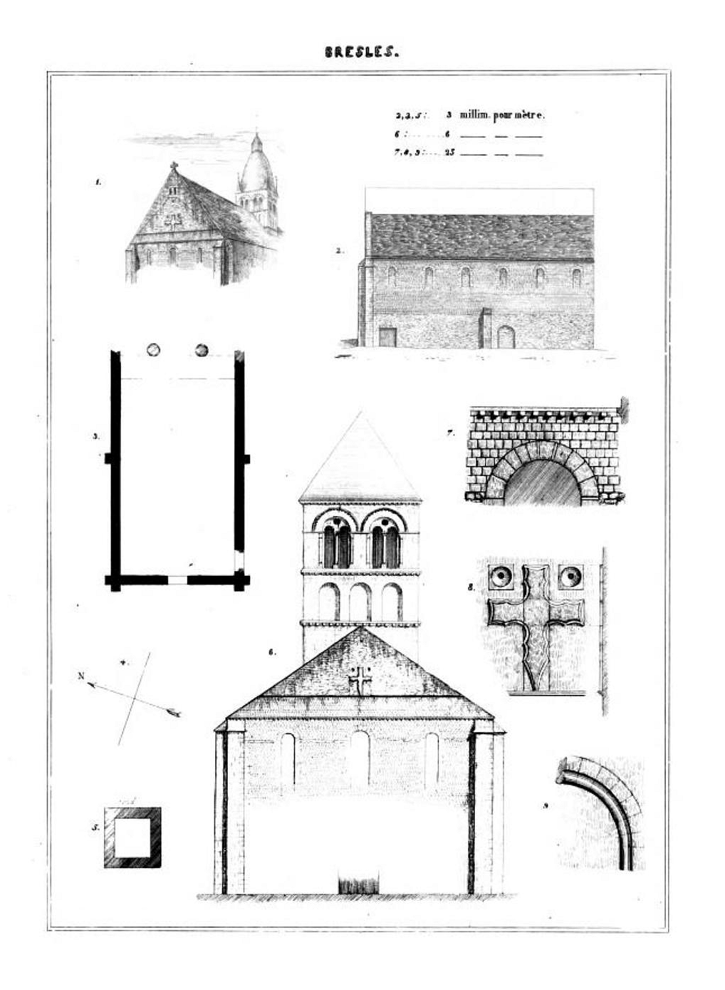 1. Vue depuis le sud-ouest avec le clocher démoli après 1850 ; 2. mur latéral sud de la nef ; 3. plan de la nef ; 4. orientation de la nef ; 5. plan du clocher ; 6. élévation ouest avec le clocher démoli après 1850, sans le dôme (reconstitution de l'état au XIIe siècle) ; 7. arc de la baie centrale de la façade occidentale ; 8. croix en bas-relief sur le pignon de la façade occidentale ; 9. mouluration de la porte bouchée au milieu du mur sud.